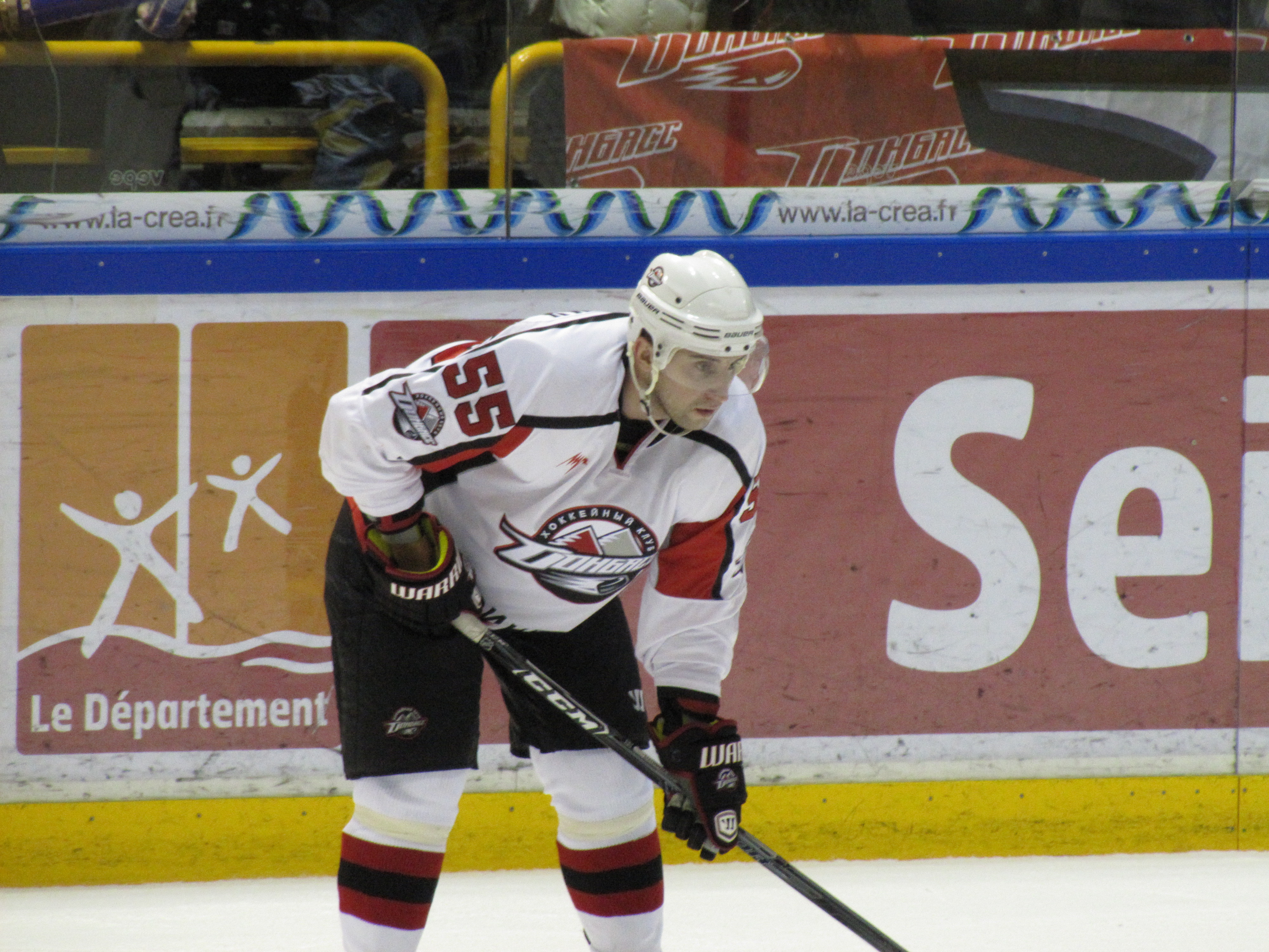 Ievgueni Gladskikh lors de la Coupe Continentale de hockey 2012 à Rouen